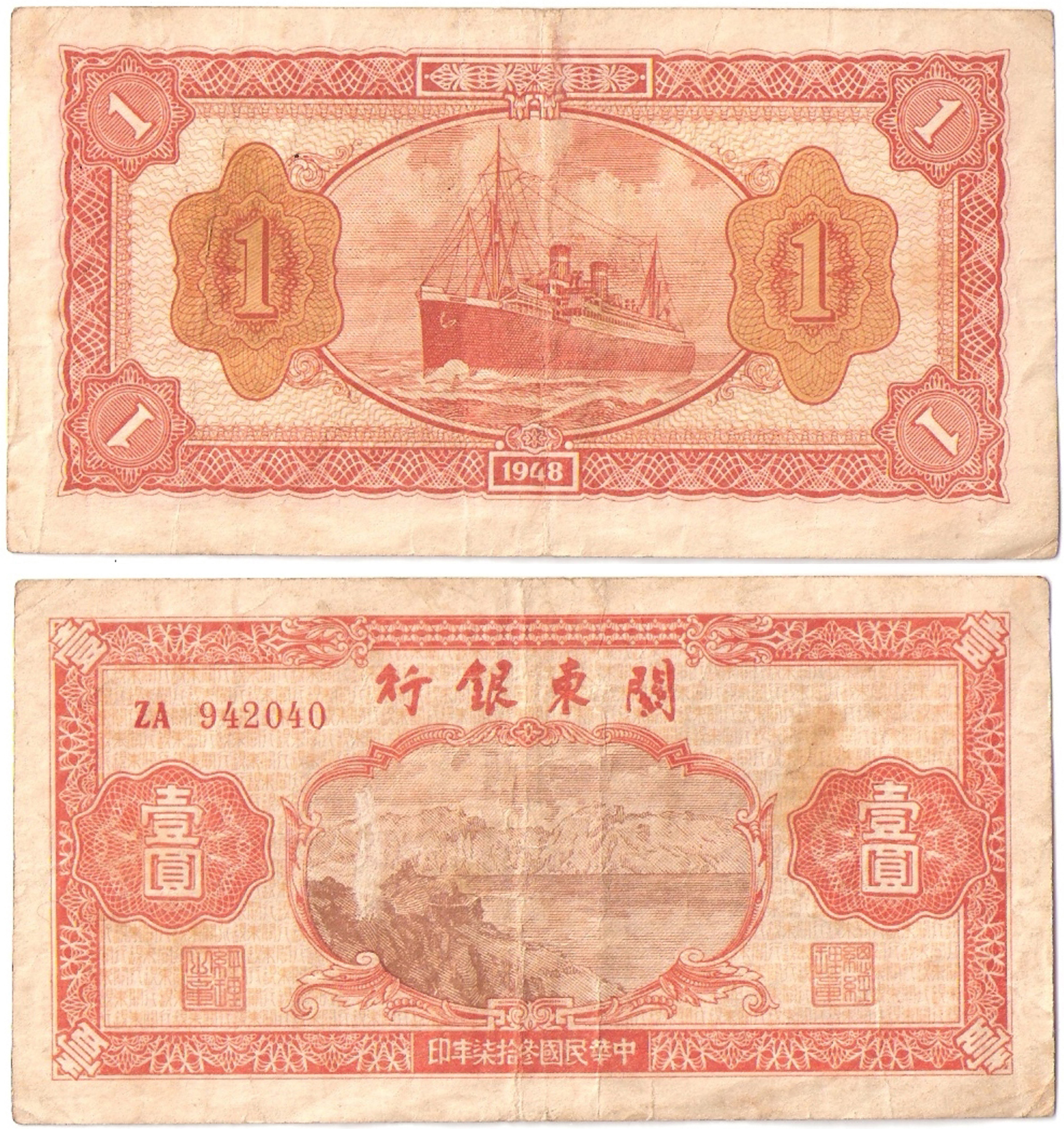 关东银行1圆，1948年。